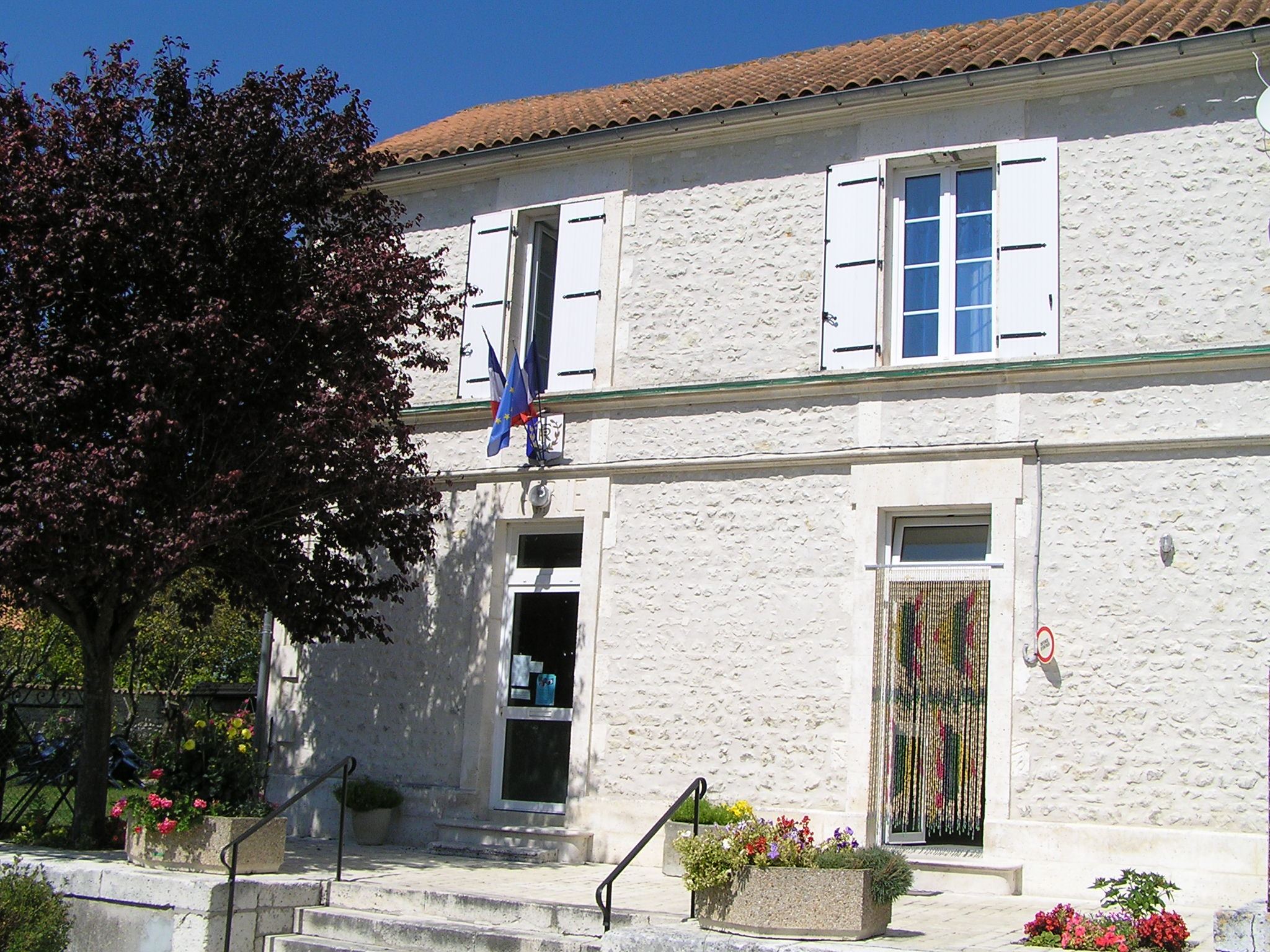 mairie de Viville